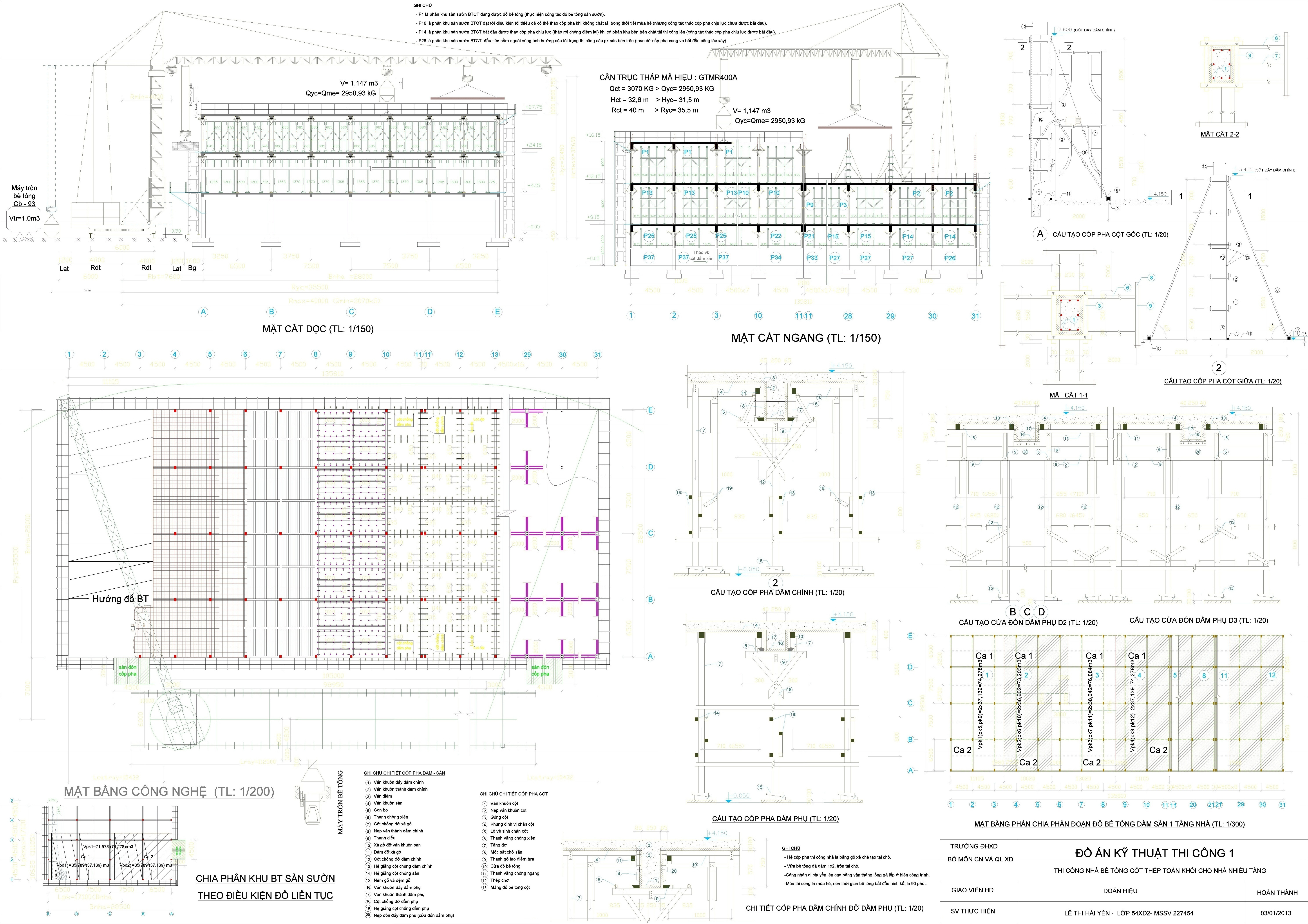 Bản vẽ đồ án công nghệ xây dựng phân thân nhà nhiều tầng bê tông cốt thép toàn khối, đã được vẽ chỉnh sửa hoàn chỉnh trên phần mềm Auto CAD rồi chuyển sang dạng ảnh.